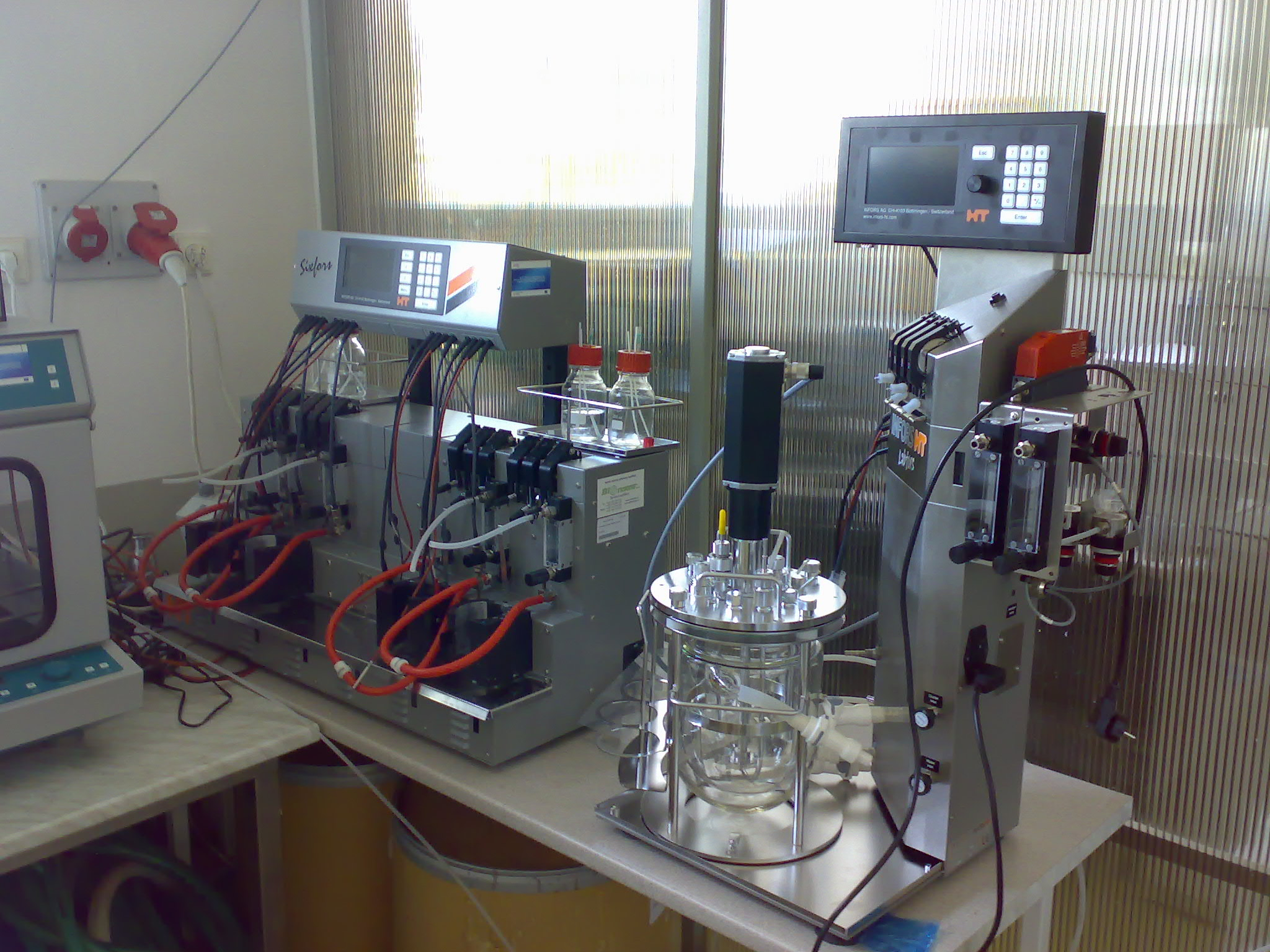 Autoklavovatelne fermentory